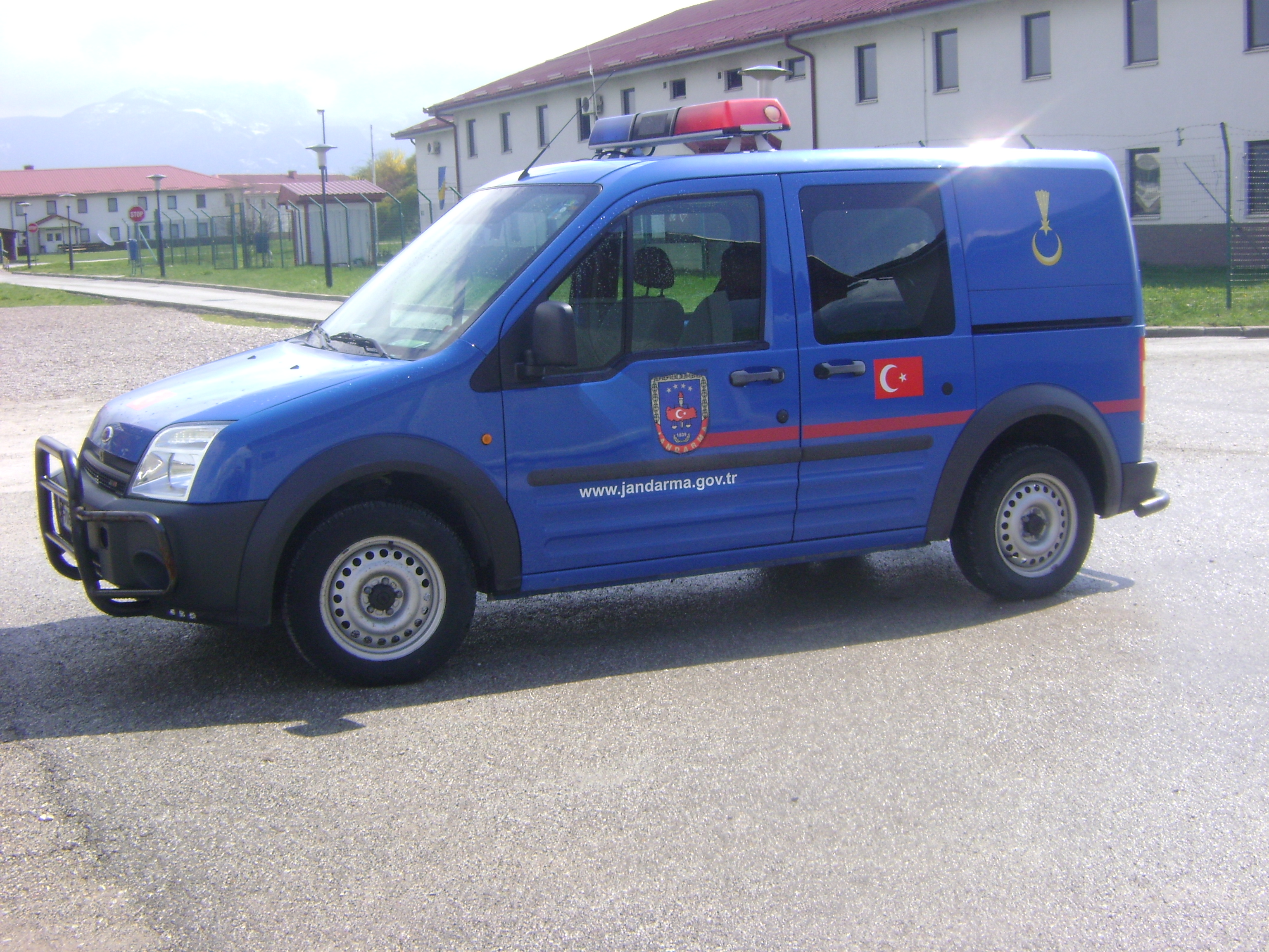 Fahrzeug der türkischen Jandarma